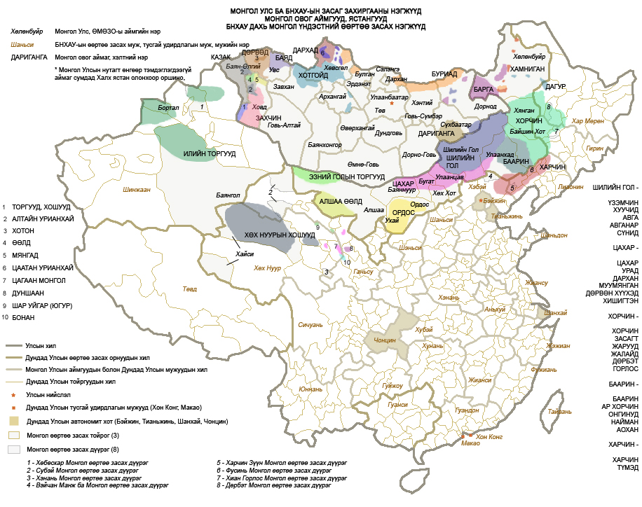 Монгол: Монгол овог аймаг, ястан